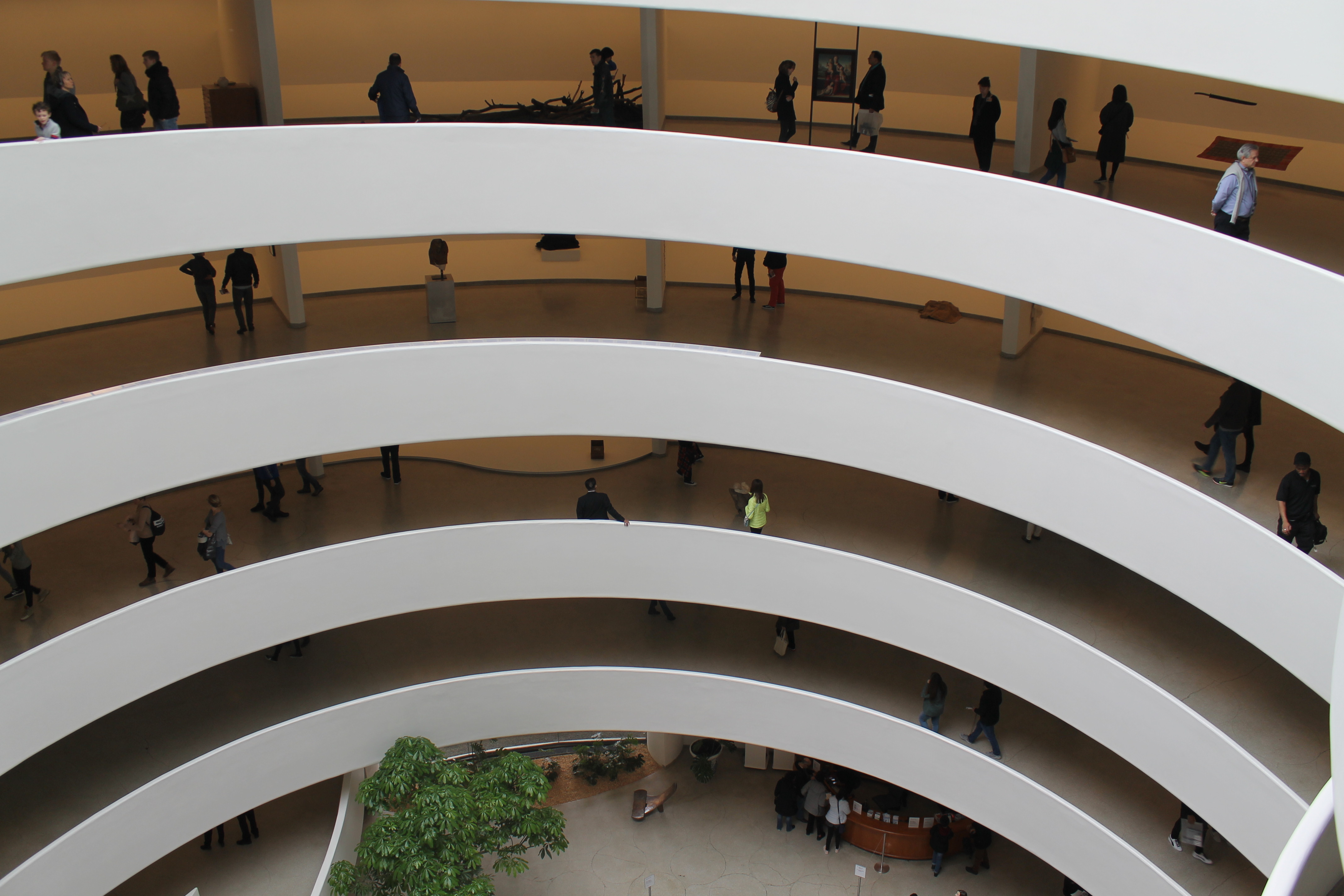 Interior del Museo Solomon R. Guggenheim de Nueva York. Fotografía de marzo de 2018.